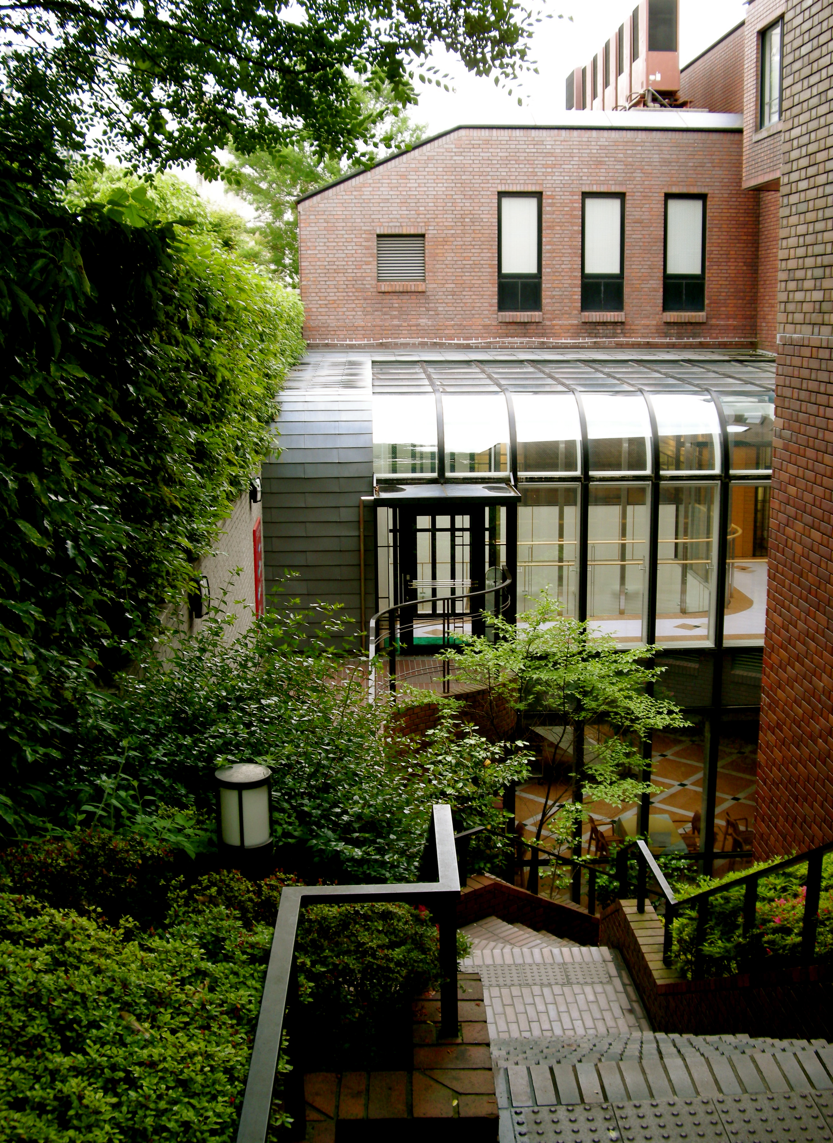 Restaurant "Calme," Suekawa Memorial Hall (Ritsumeikan University, Kyoto, Japan)